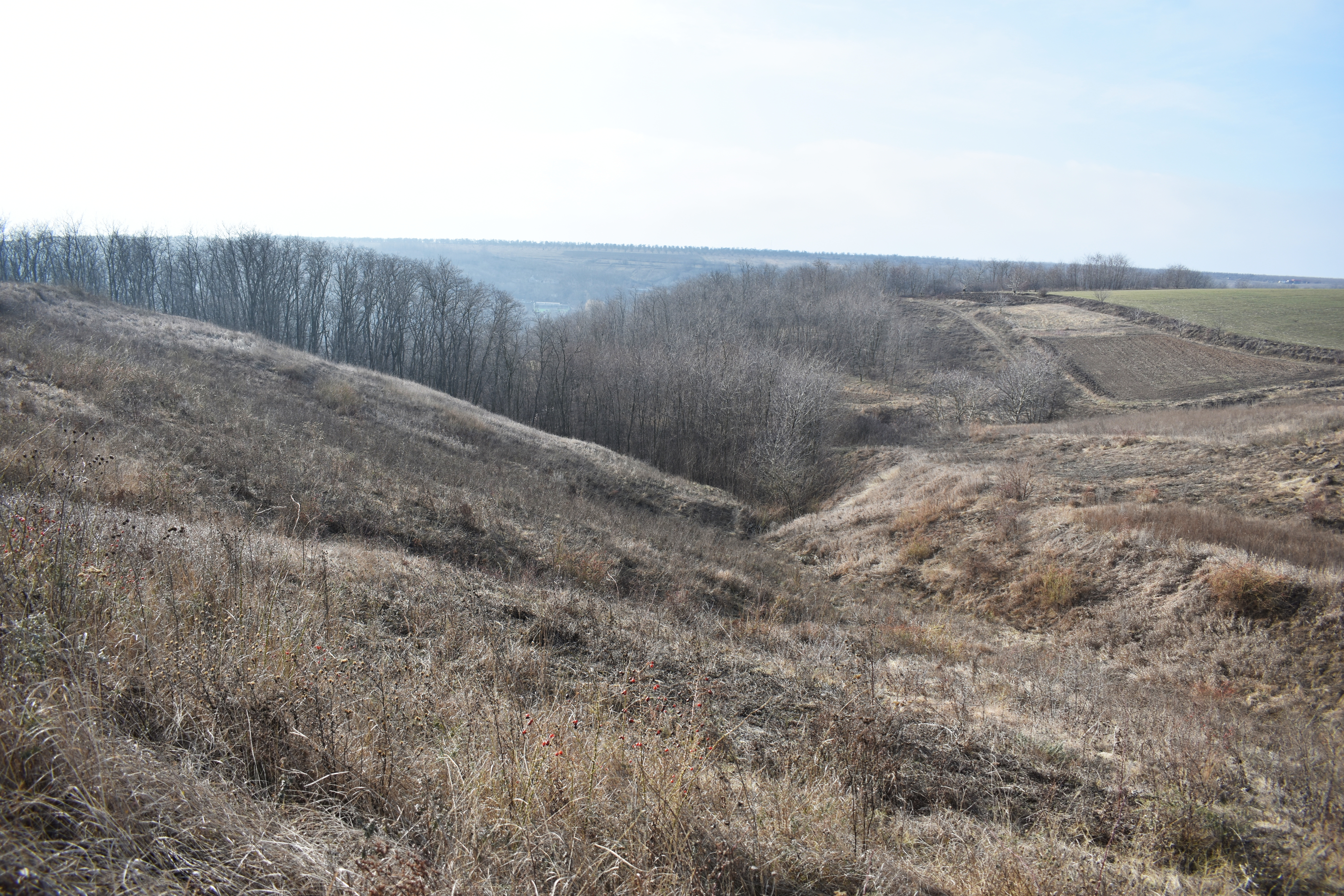 РЛП Дністер у селі Криштофівка Могилів-Подільського району Вінницької області